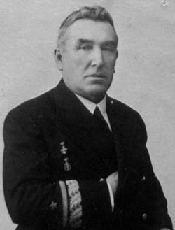 Antonio Azarola y Gresillón